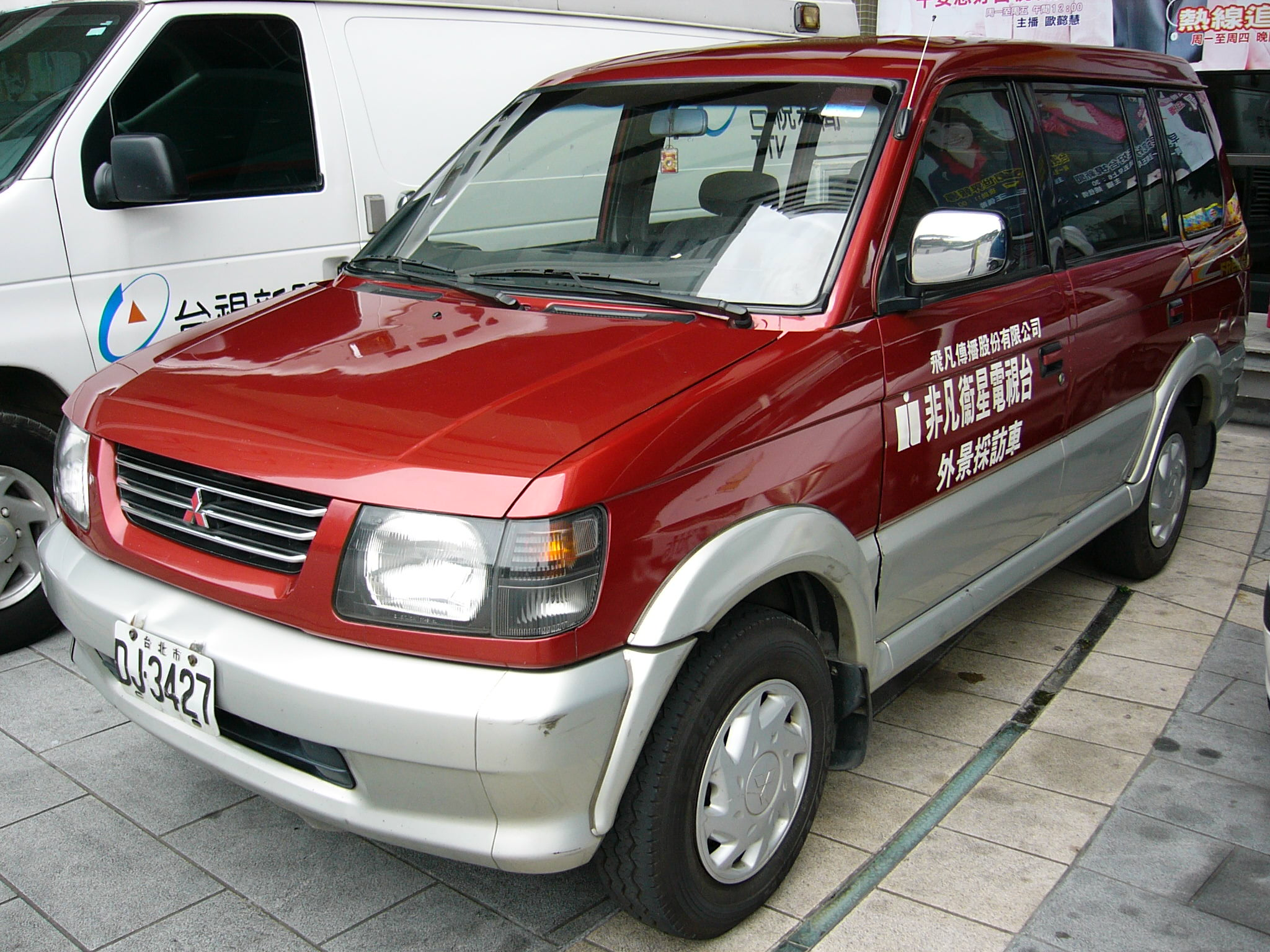 非凡衛星電視台三菱Freeca外景採訪車DJ-3427左前方外觀。